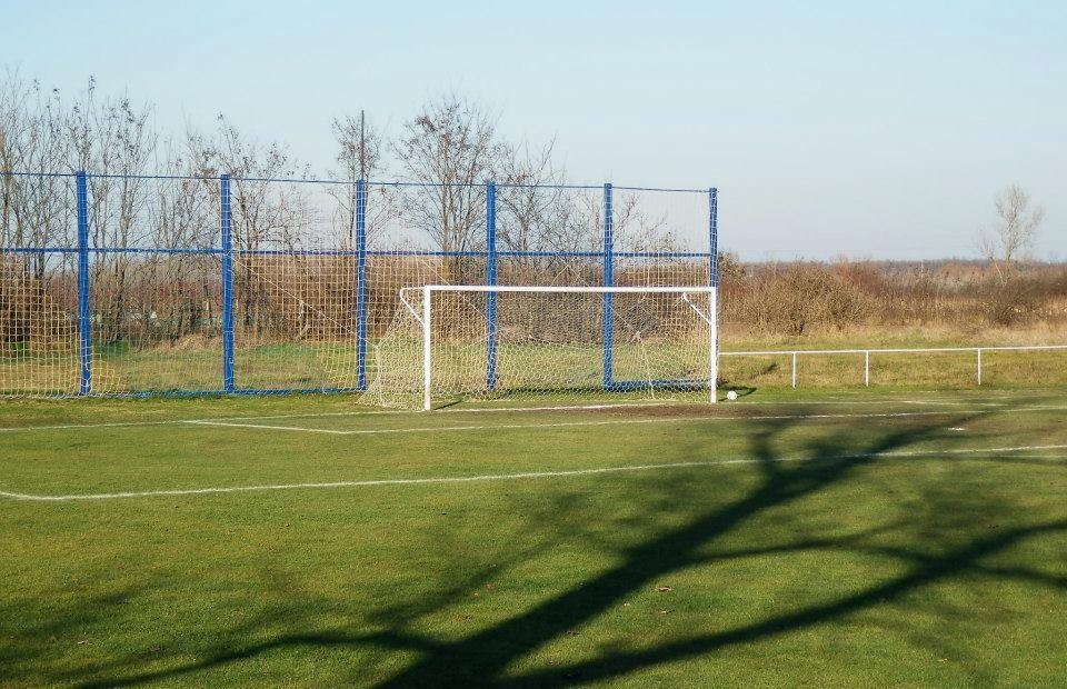 Balkány sportpályája